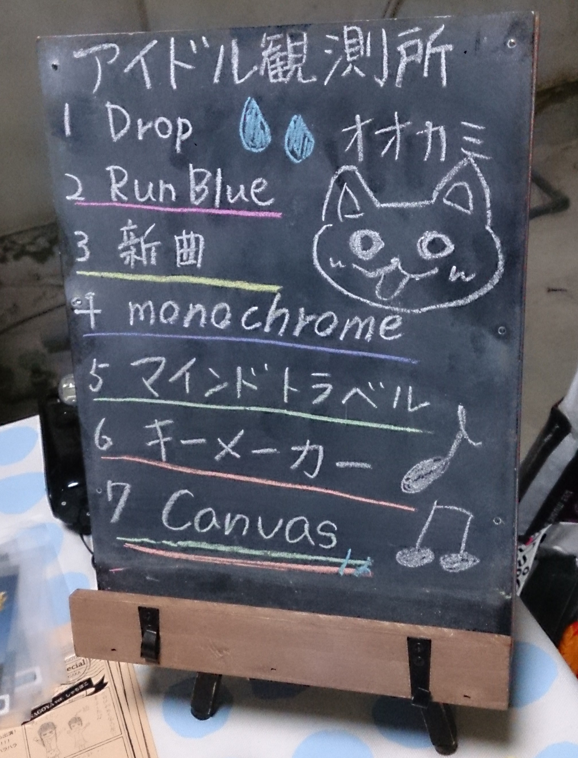 amiinaセトリボード(20150322(2))